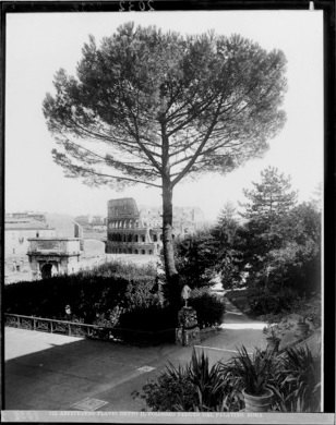 Veduta dell'Anfiteatro Flavio o Colosseo dai giardini di Villa Mills sul Palatino